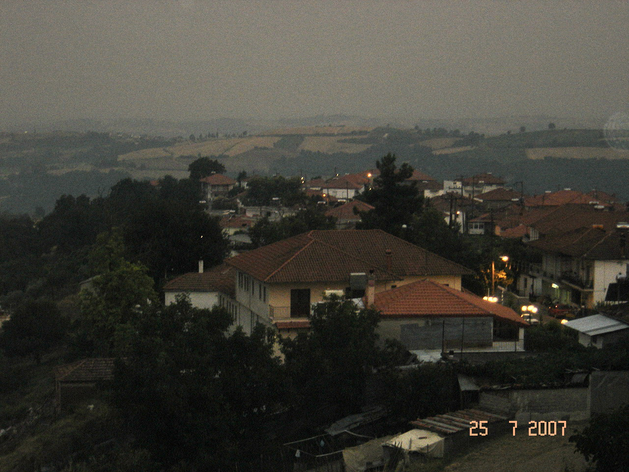 Ryakia at night.